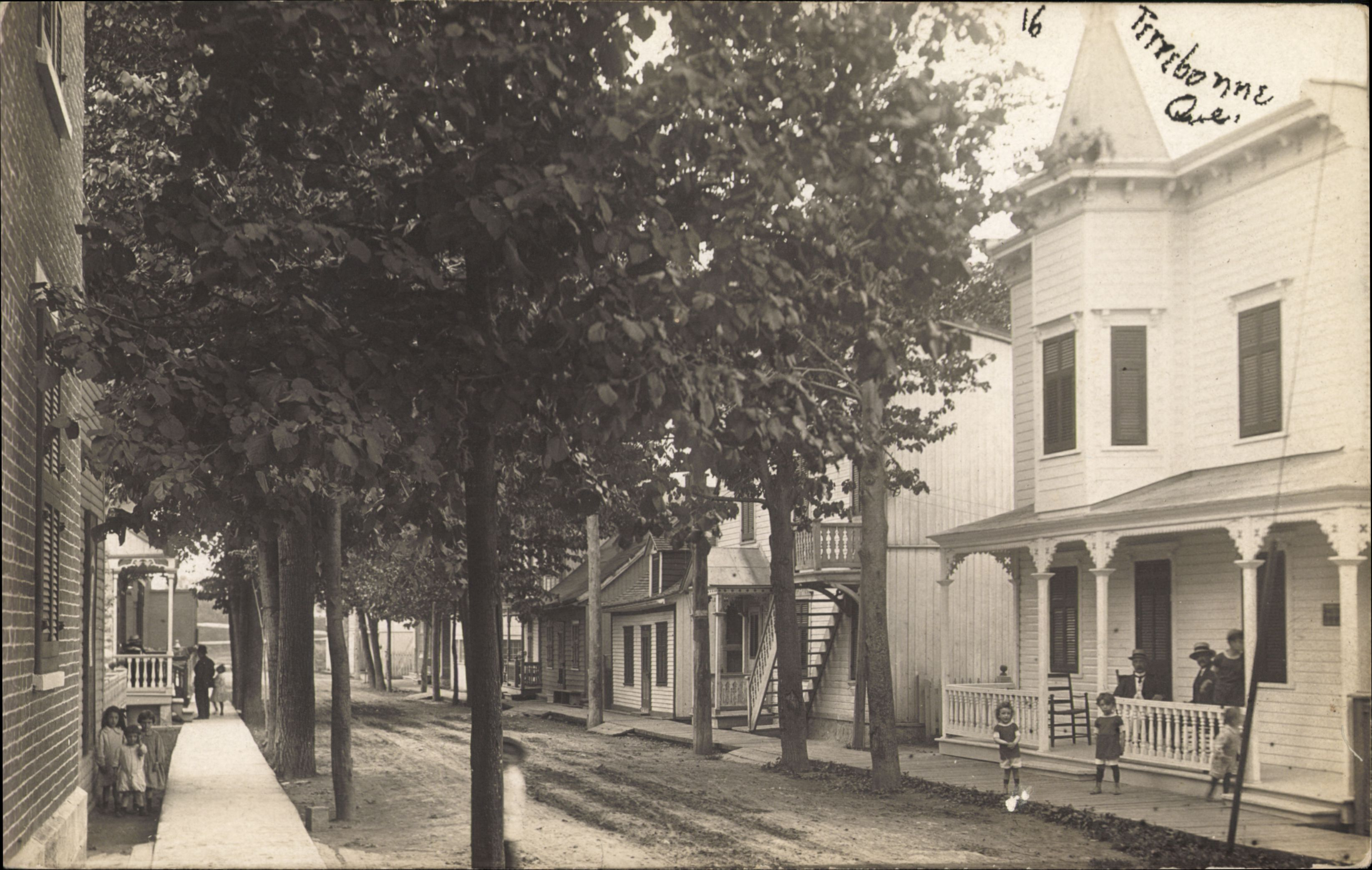 Terrebonne, Que., carte postale, L. Gobeille